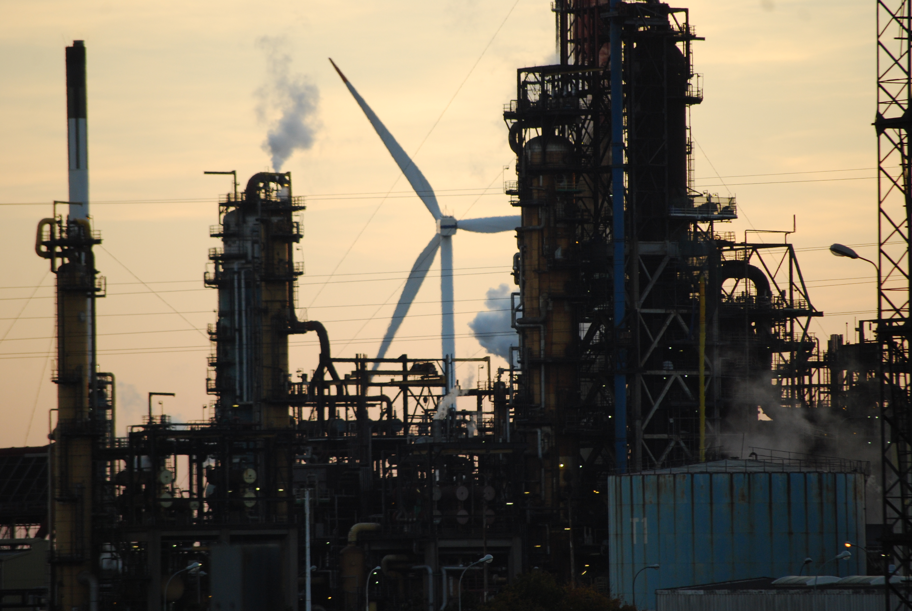 Mardyrck